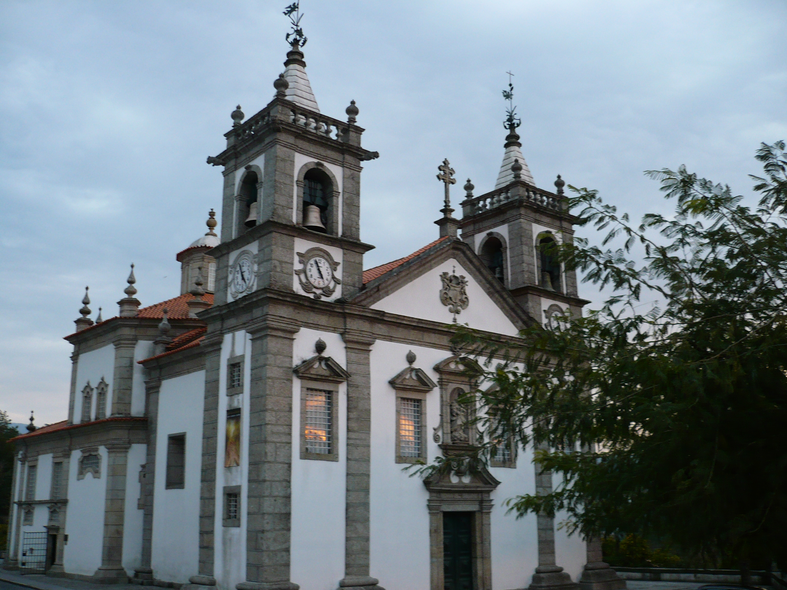 Santuário de Nossa Senhora de Porto de Ave, Taíde, Póvoa de Lanhoso, Portugal